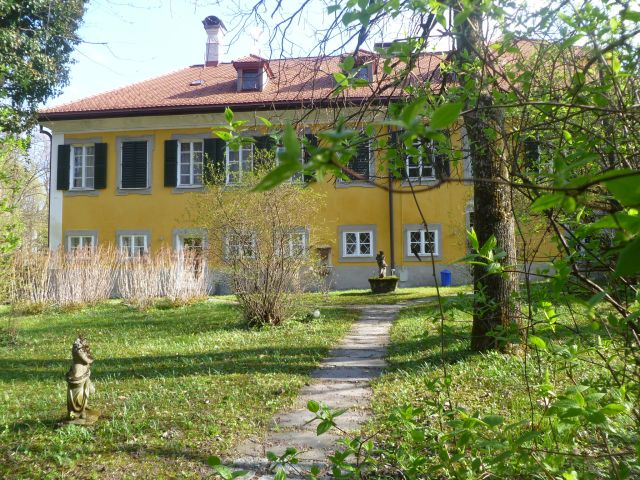 Rauchenbichlerhof in Salzburg, Seitenansicht von Nordosten